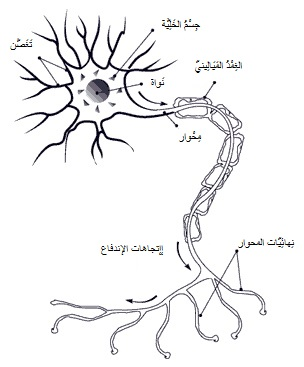 رسم تخطيطي للخلية العصبية